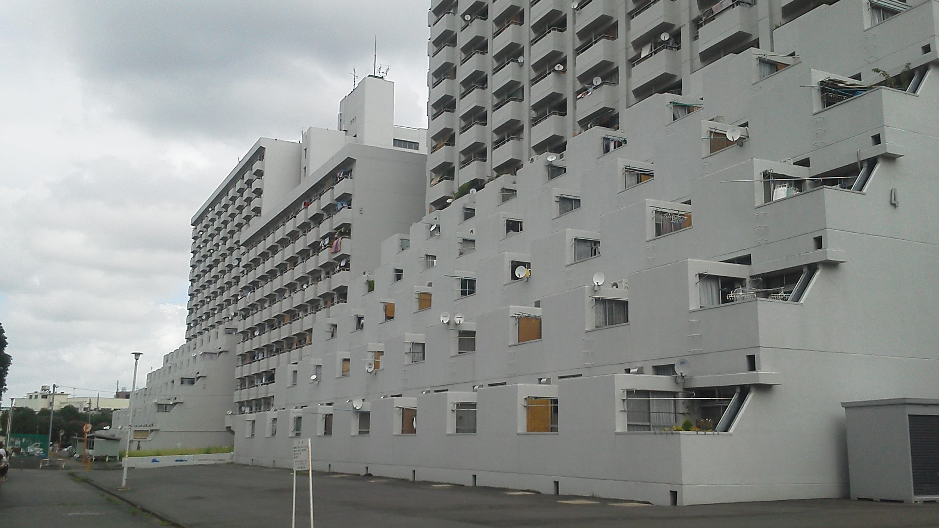 河原町団地（神奈川県川崎市幸区河原町）。